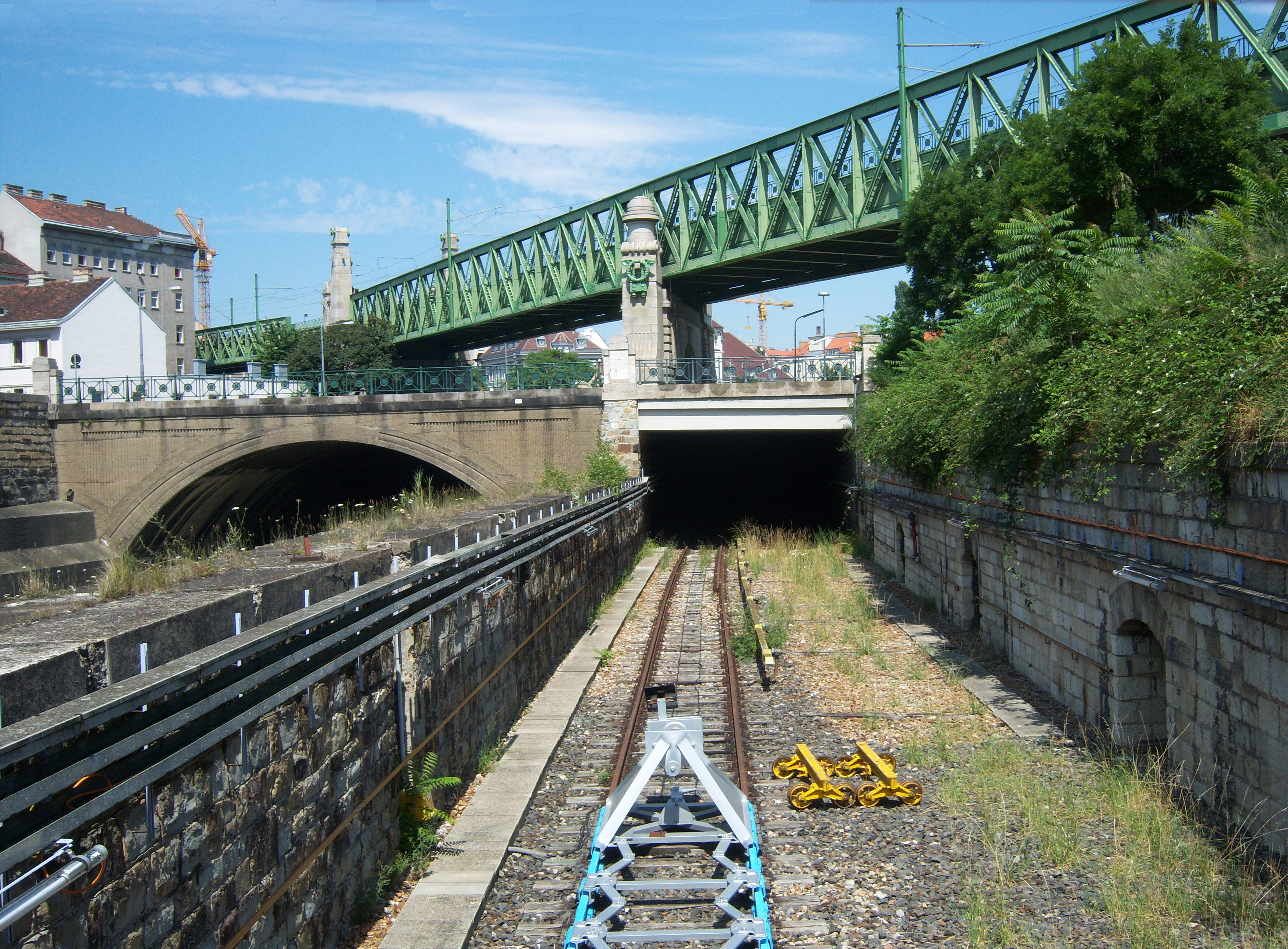 Hier verkehrte einst die Wiental-Linie der Stadtbahn. Deren Trasse, die heute von der U4 befahren wird, wurde in einen neuen unterirdischen Tunnel verlegt. An der ursprünglichen Stelle befindet sich nun ein Abstellgleis, das nach der Station Margaretengürtel von der U4-Strecke abzweigt. Das zweite Gleis wurde abgetragen.